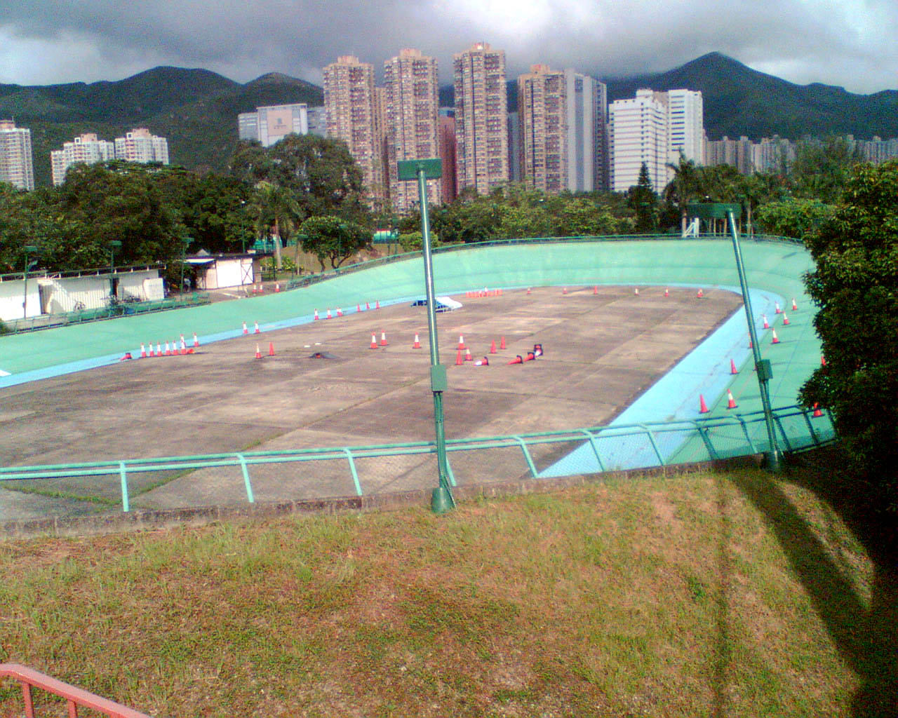 香港體育學院戶外鑊形單車訓練場